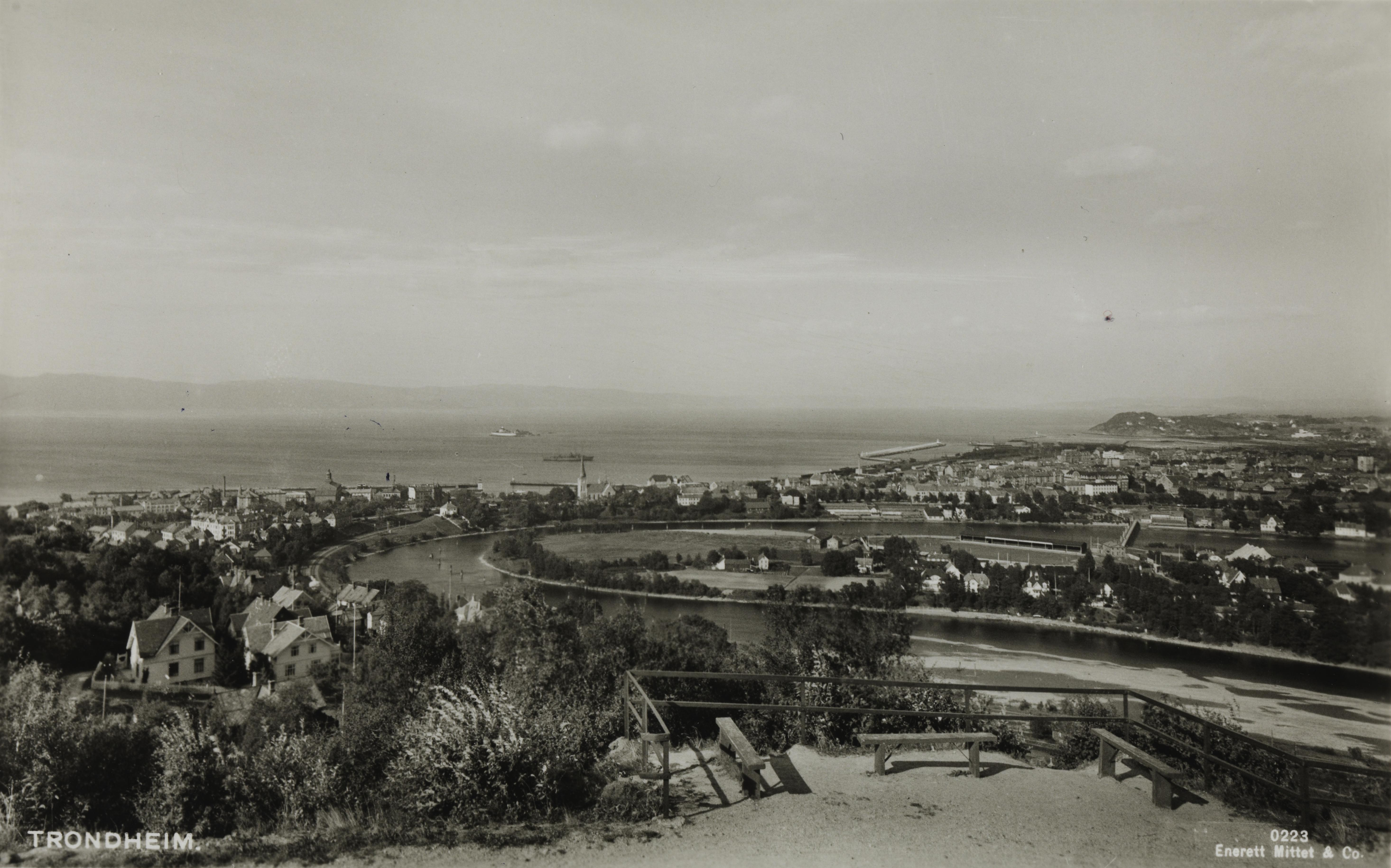 Bildet er hentet fra Nasjonalbibliotekets bildesamling Trondheim, Sør Trøndelag